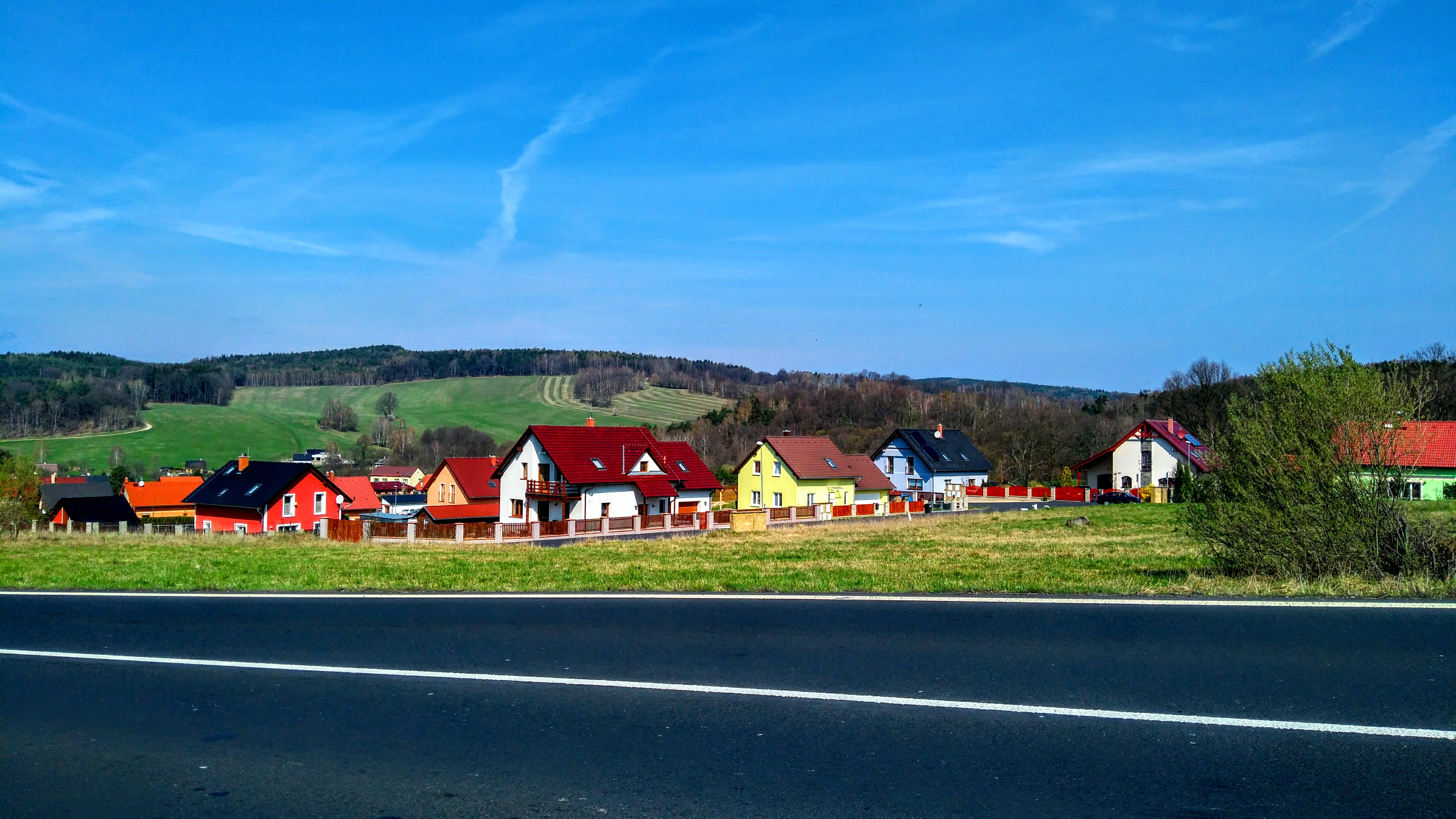 Novostavby Ludvíkovic od silnice č. 13.